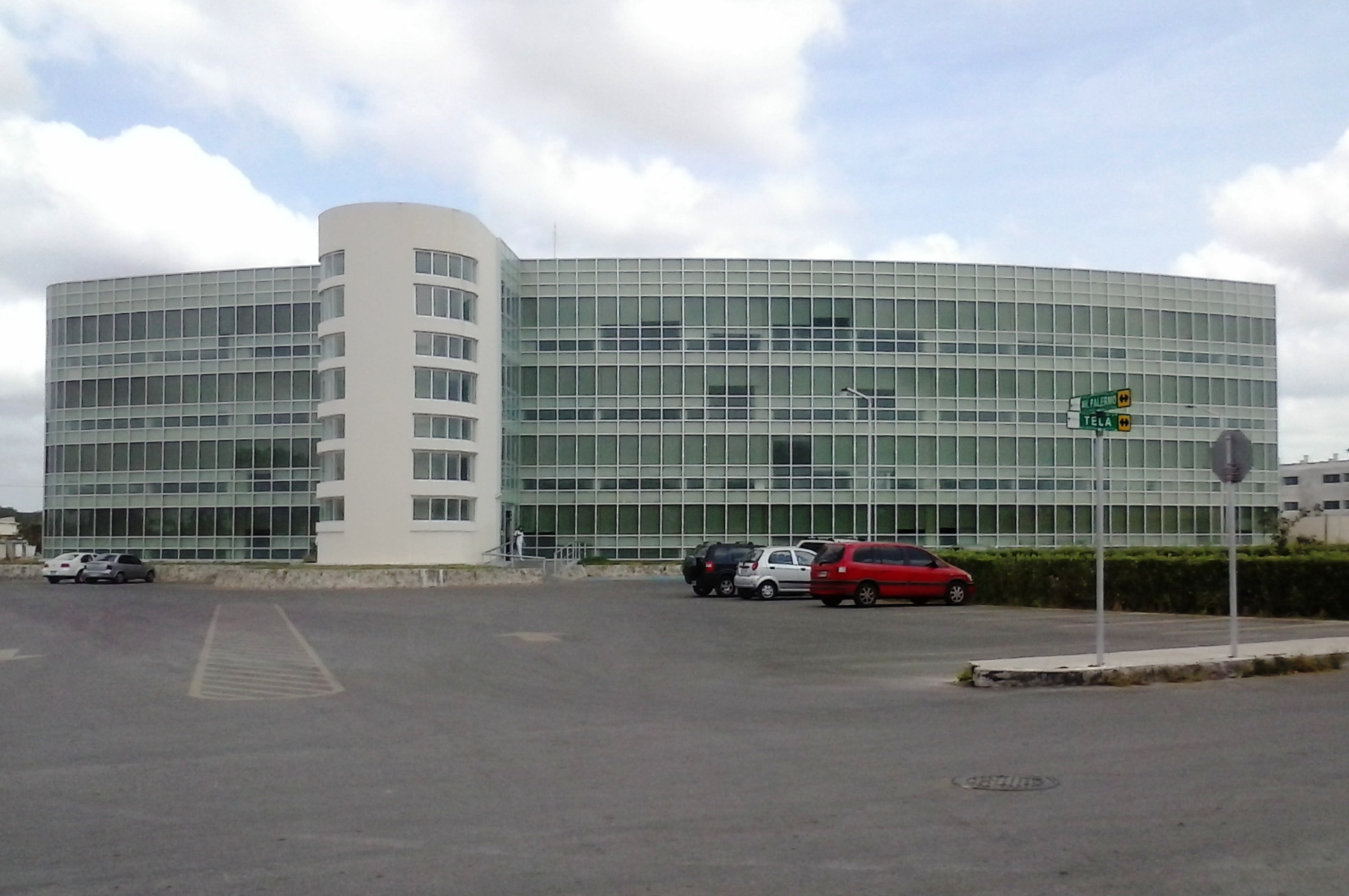 División de Ciencias de la Salud de la Universidad de Quintana Roo. Vista desde la Calle Tela.